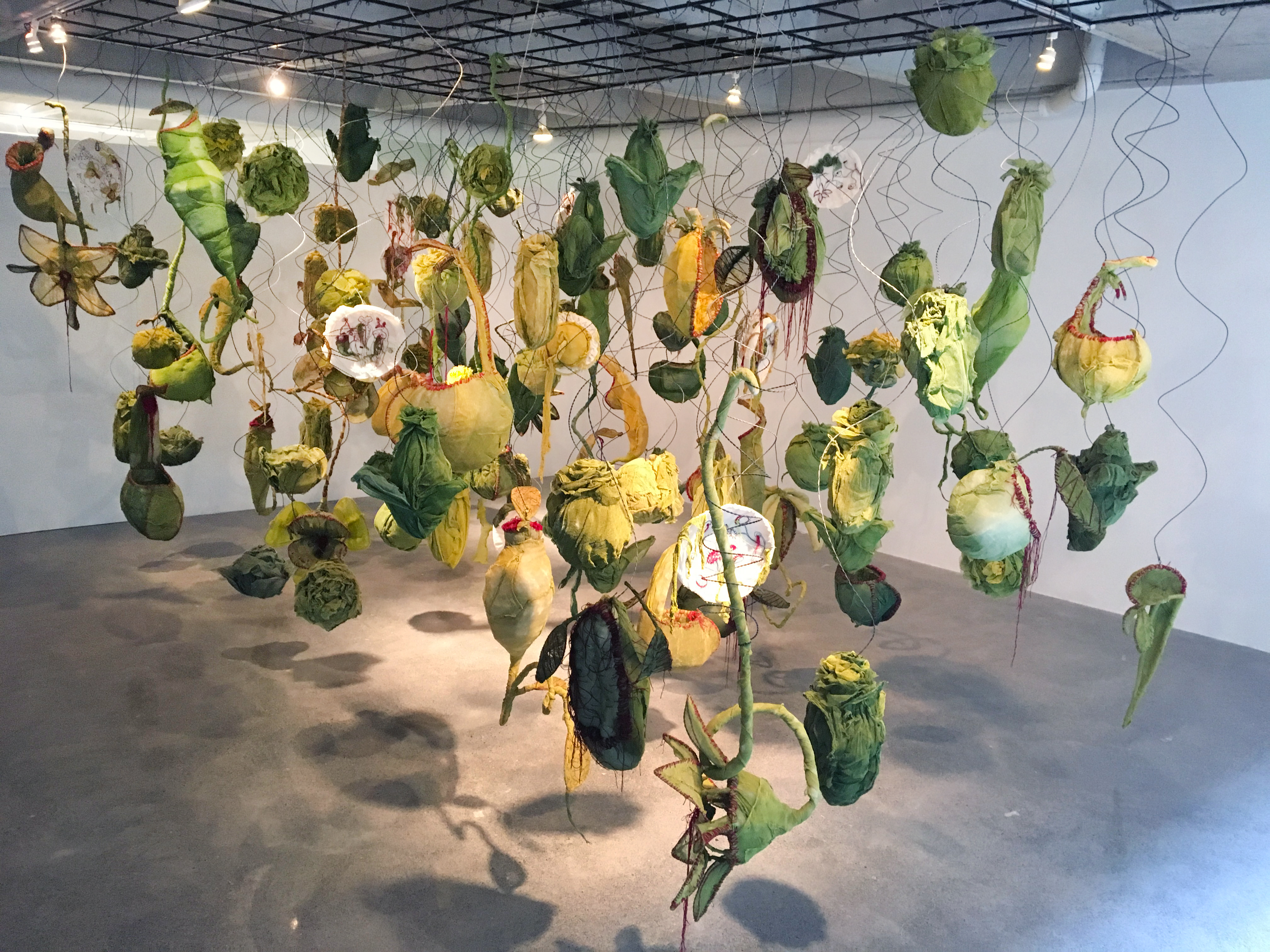 Esta es una fotografía de registro de la obra de Miriam Medrez, artista mexicana. La instalación fue montada por la propia artista en la Galería Emma Molina en la ciudad de Monterrey.